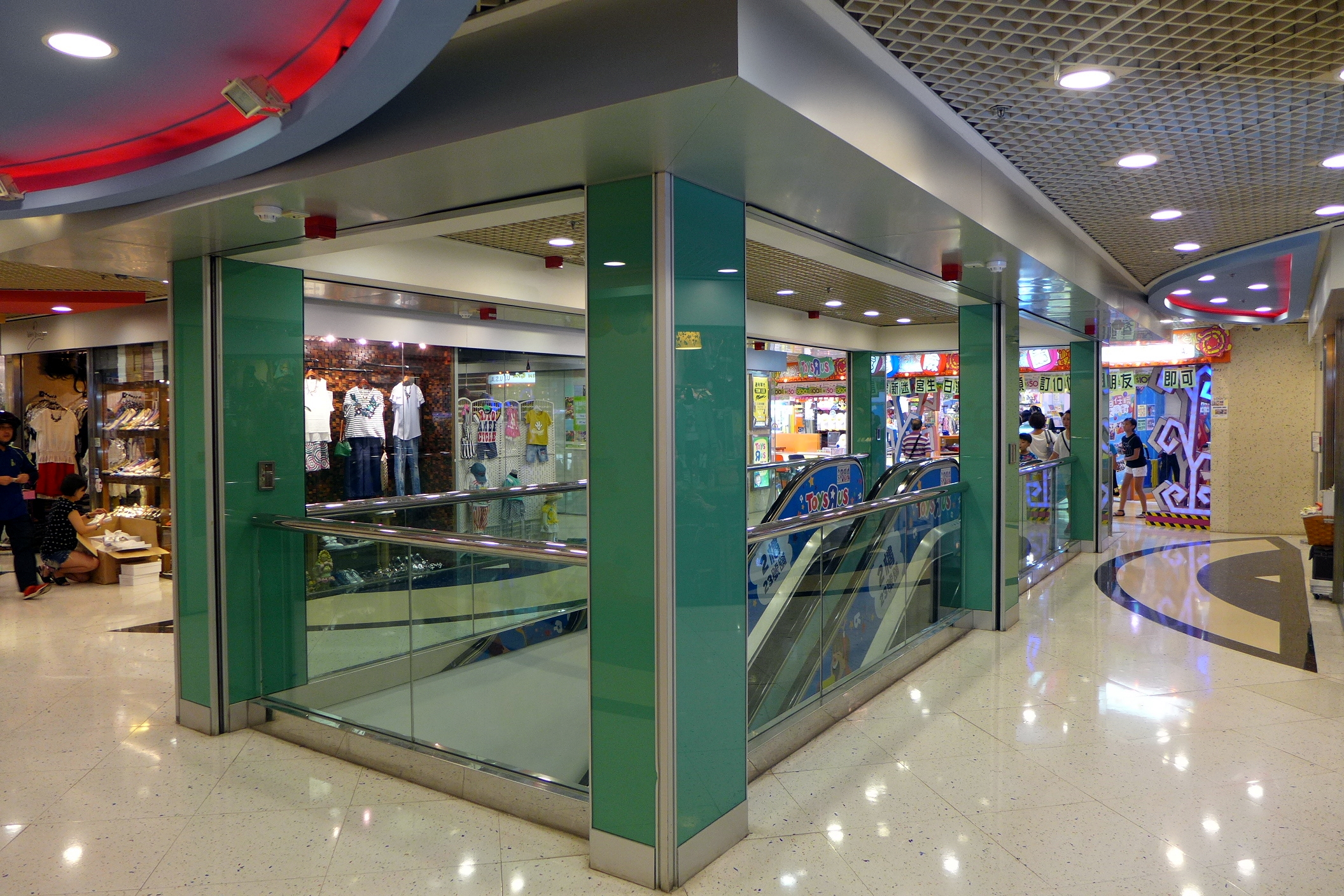 Aberdeen Centre Plaza ac2 shops